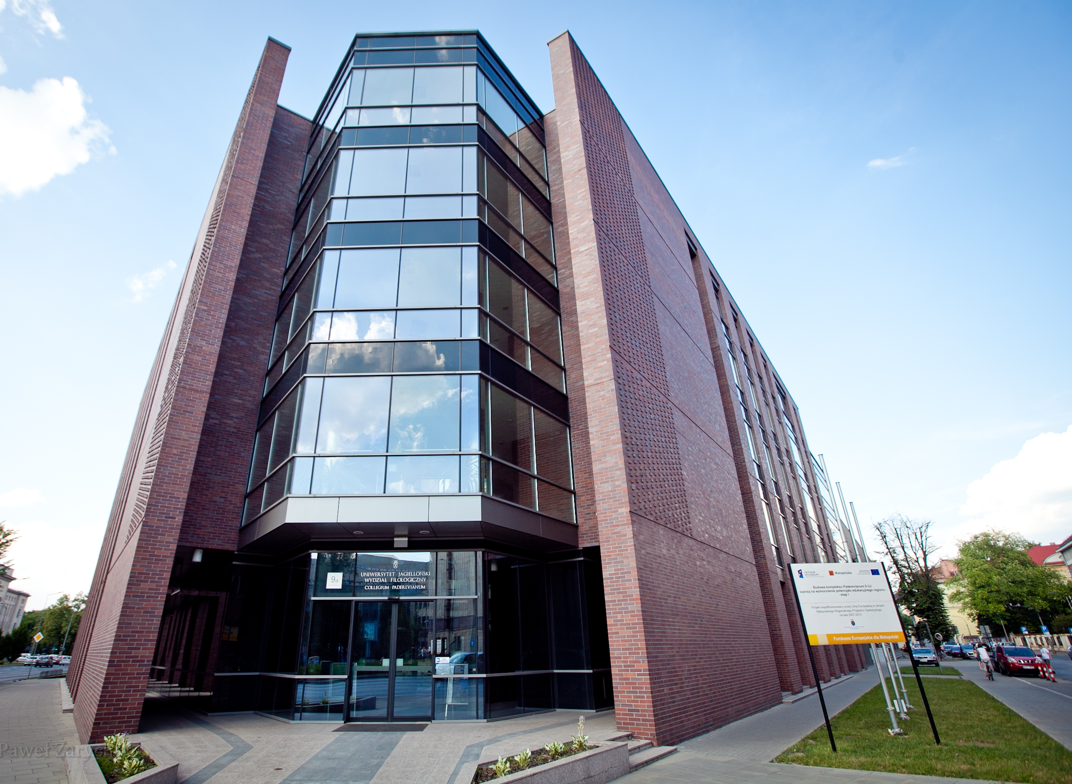 Budynek Paderevianum II, widok ze skrzyżowania al. Mickiewicza i ul. Krupniczej